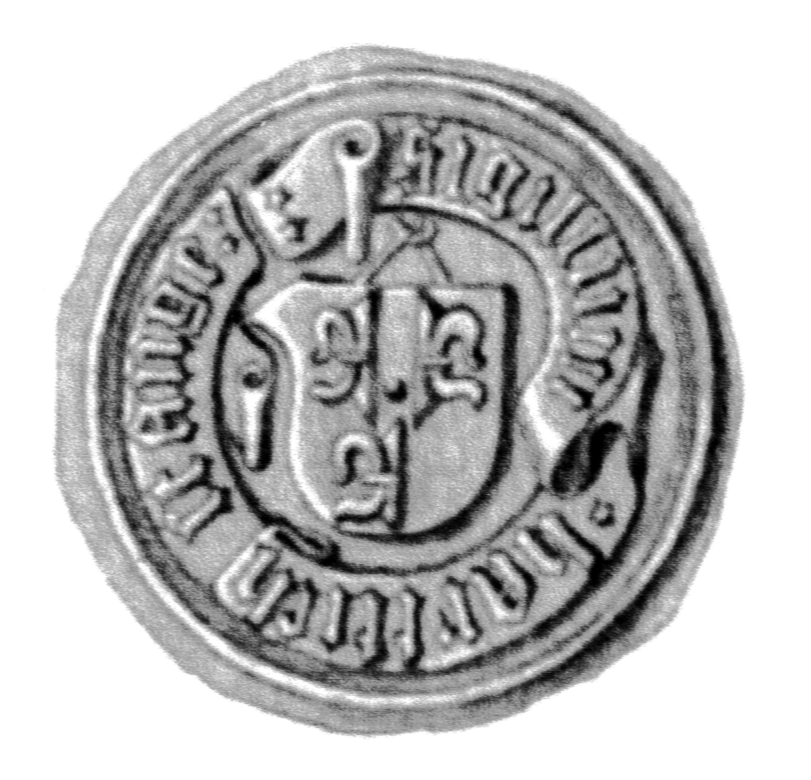 Siegel des Ratsmannes Hartwig (Hartich) Stange. Das Siegel stammt aus der Zeit um 1493. Siehe Emil Ferdinand Fehling: Lübeckische Ratslinie, Nr. 601 (Hartwig Stange).